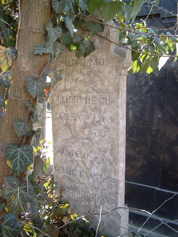 Gellért Lajos (Irsa, 1885. november 5. – Budapest, 1963. január 28.) színész, érdemes művész (1956), író sírja Budapesten. Kozma utcai zsidó temető: 3C-2-4.